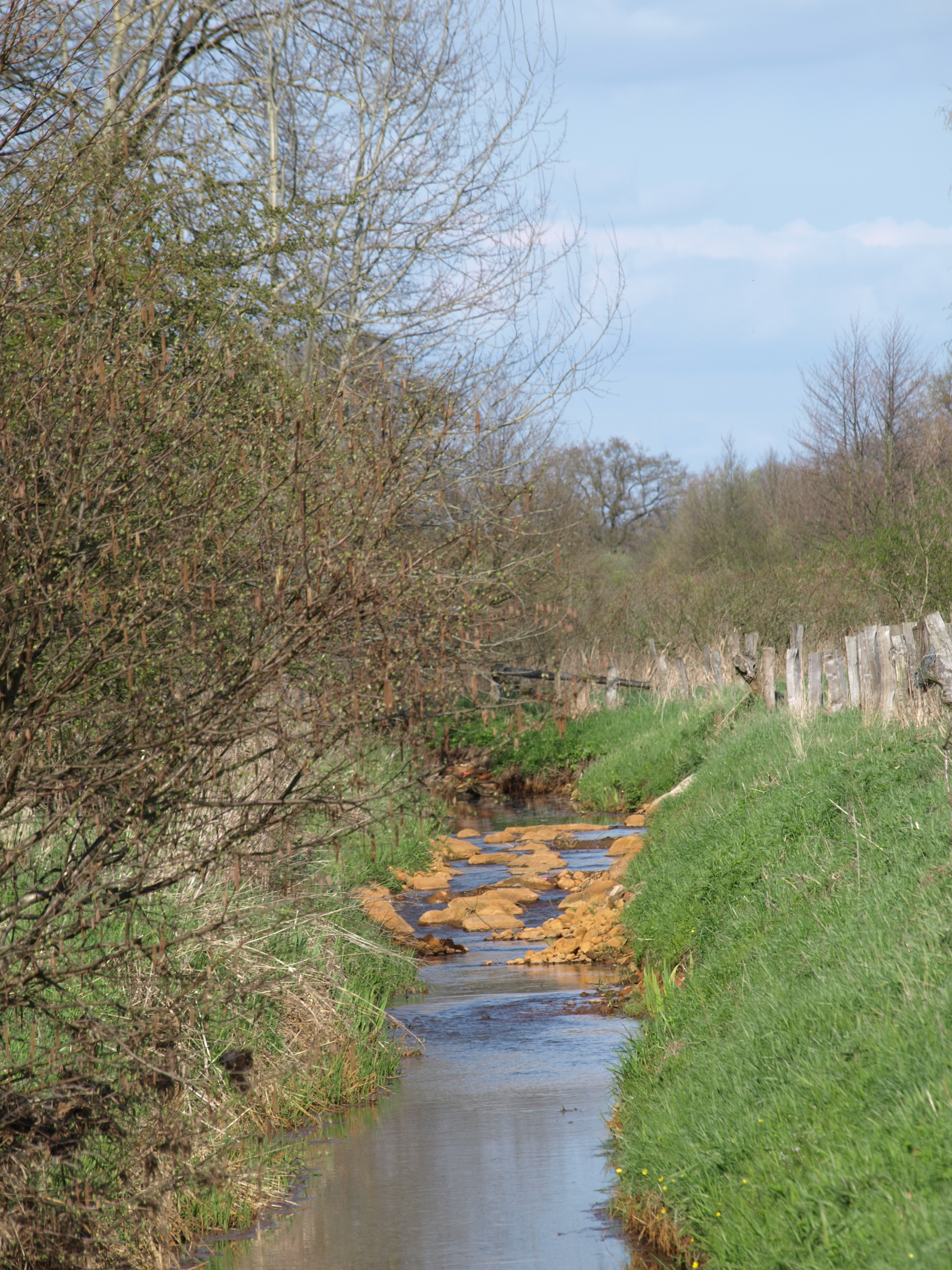 Sohlgleite in der Beck bei niedrigem Wasserstand